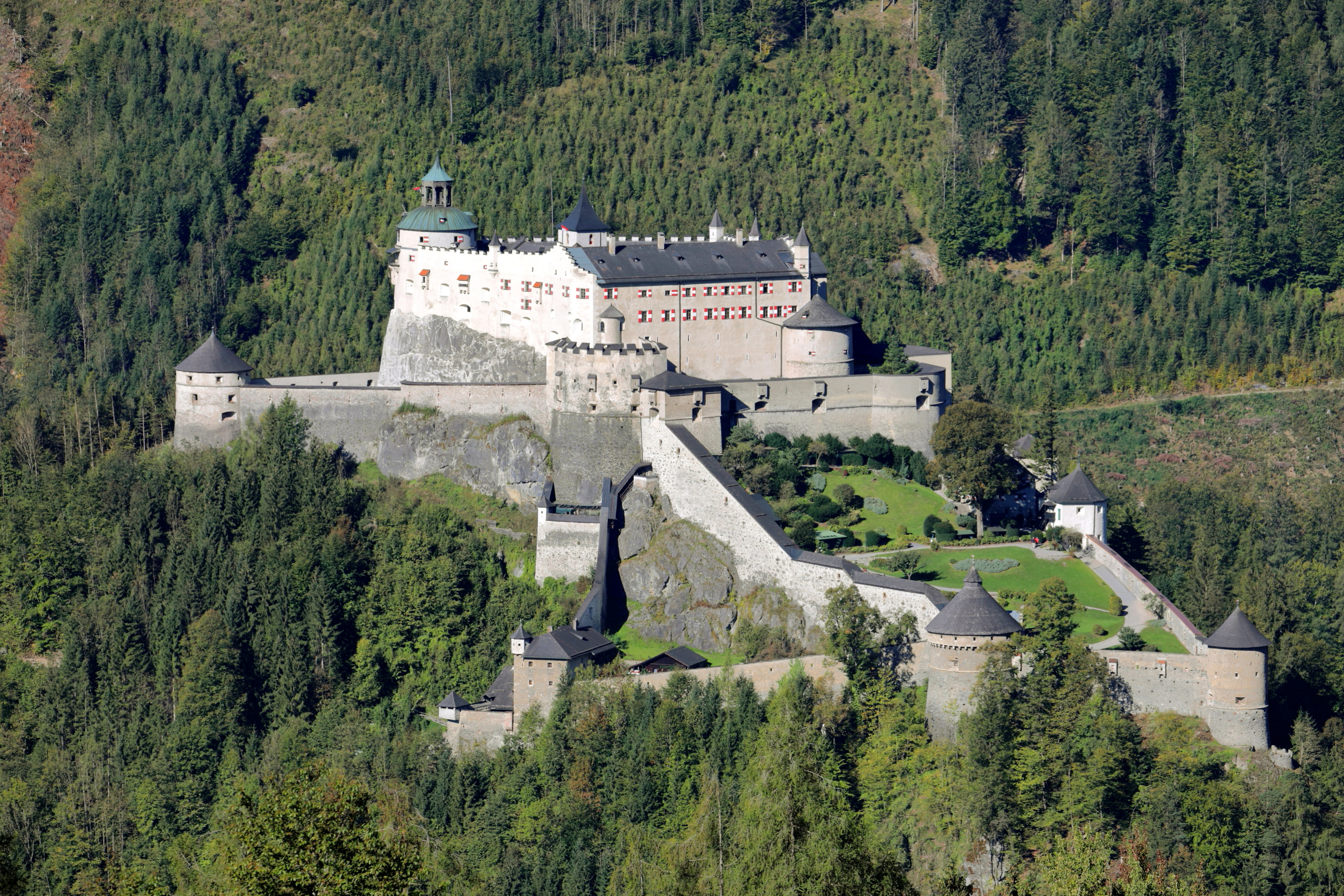 Ostsüdostansicht der Burg Hohenwerfen, auch als Festung Hohenwerfen bezeichnet, in der Salzburger Marktgemeinde Werfen.Die ab dem 11. Jahrhundert errichtete Burg war ein strategisches Bollwerk zwischen dem Tennen- und Hagengebirge auf einem 155 Meter hohen markanten Felskegel im Salzachtal.